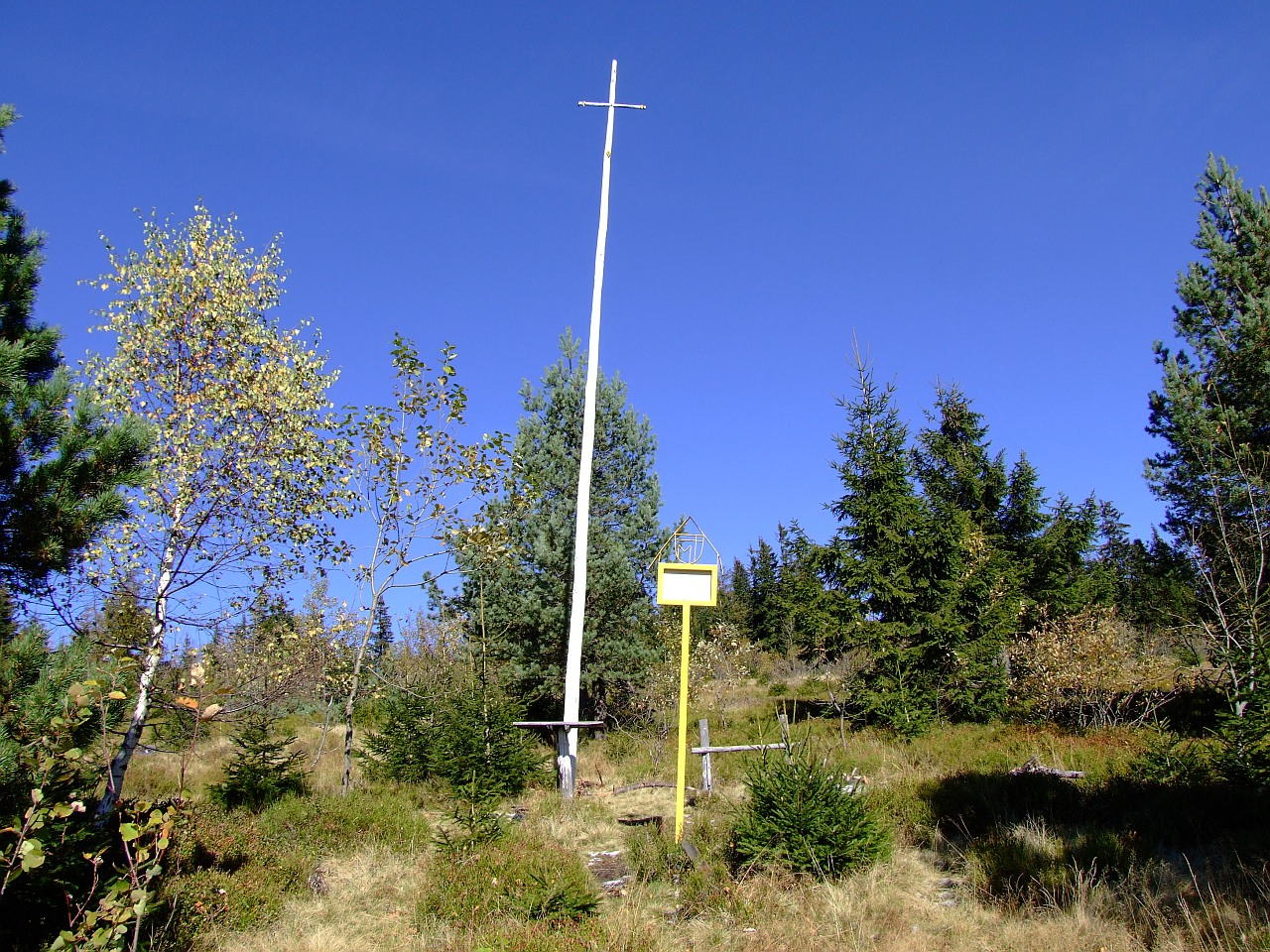 Zarastająca polana Gorc Gorcowski pod szczytem Gorca